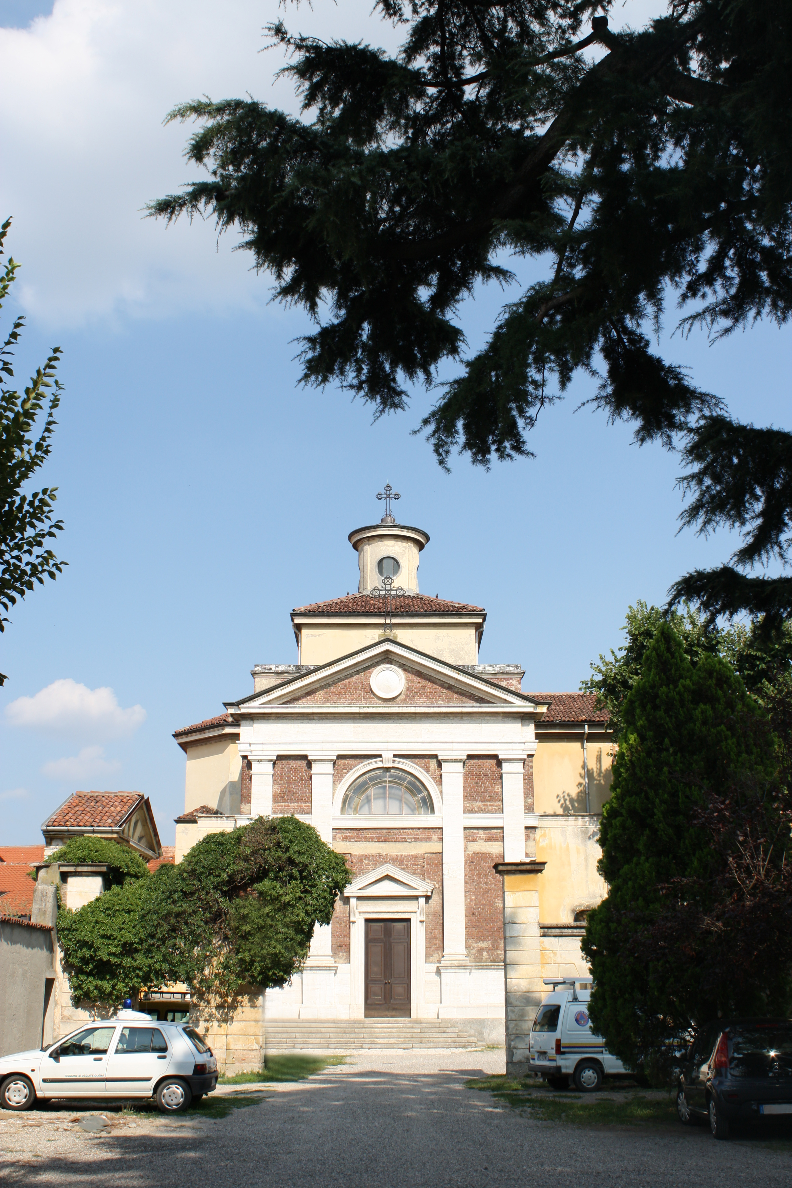 Cappella dedicata al Santissimo Crocifisso di Villa Greppi-Gonzaga a Olgiate Olona (VA)